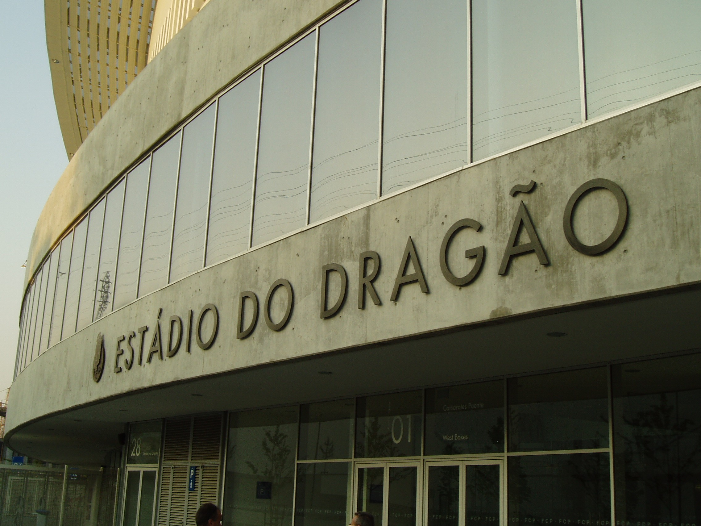 Haupteingang